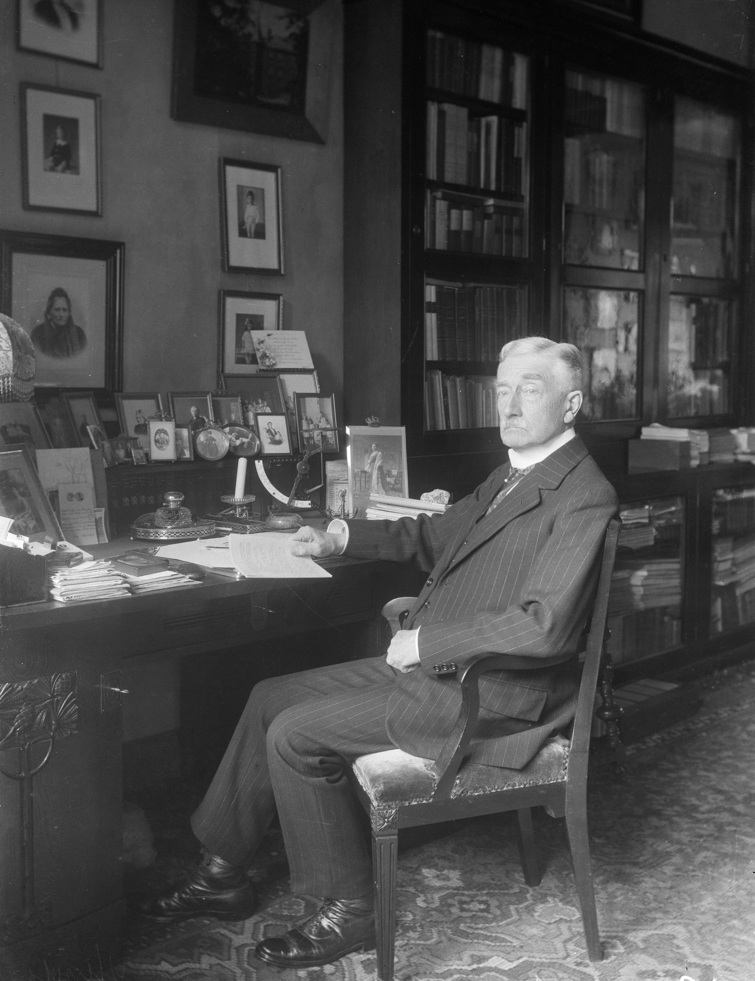 Portret van mr. Alexander Frederik baron van Lynden, geboren Amsterdam 6 maart 1856, secretaris-generaal ministerie van Binnenlandse Zaken (1906-1908), burgemeester van Utrecht (1908-1914), lid van het College van Curatoren van de Utrechtse universiteit (1908-1915), president-curator (1915-1929), ridder in de Orde van Nederlandse Leeuw, commandeur in de Orde van Oranje-Nassau, overleden Utrecht 2 november 1931.